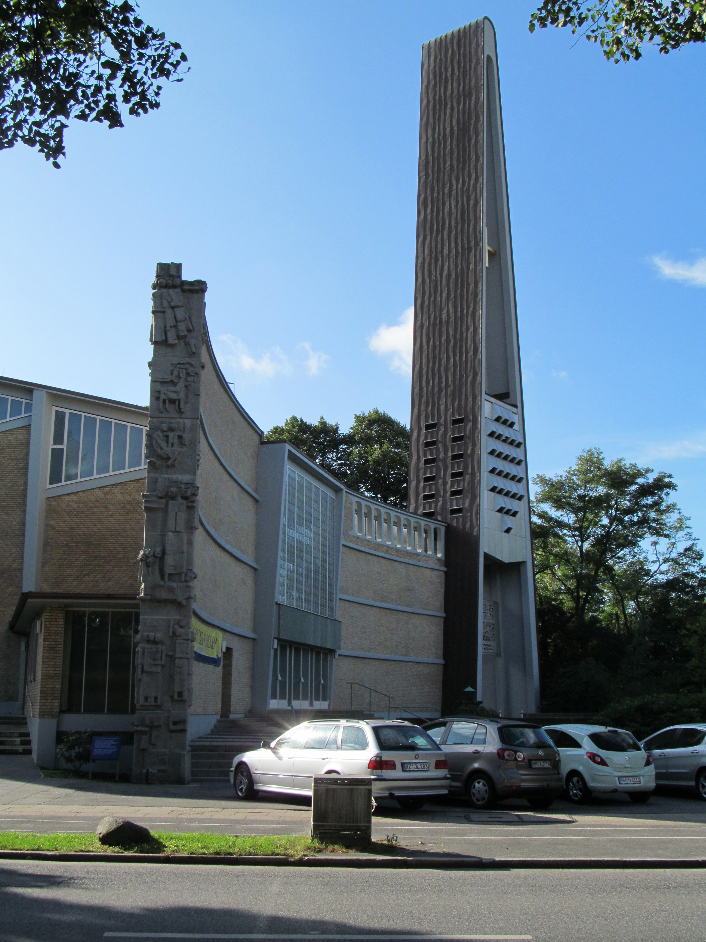 Dreifaltigkeitskirche Hamburg-Hamm, Westfassade und Turm